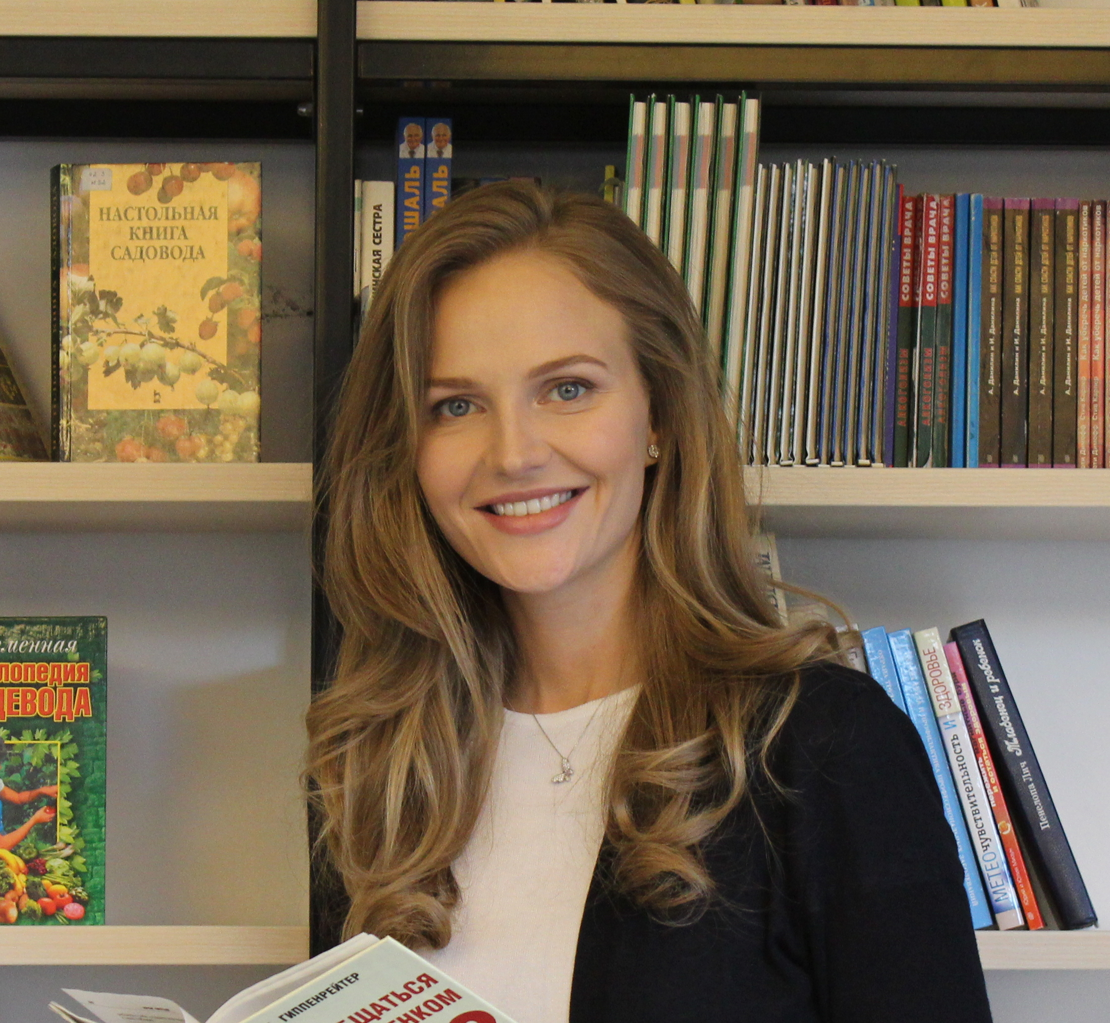 Светлана Королёва- победительница конкурса красоты «Мисс Россия 2002»